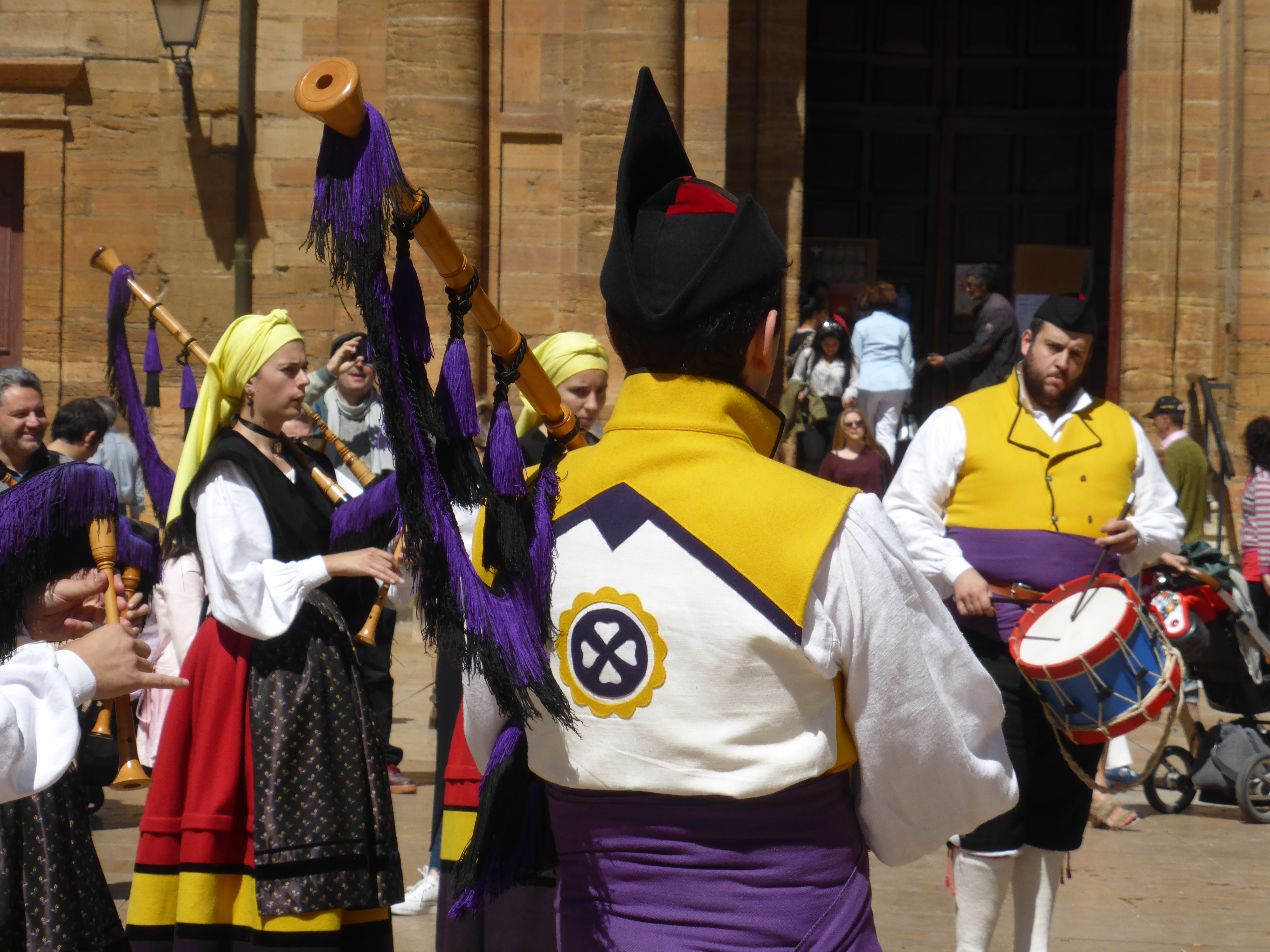 Junto a la iglesia de San Isidoro, en Oviedo, en la plaza de la Constitución, una banda de gaiteros está tocando.